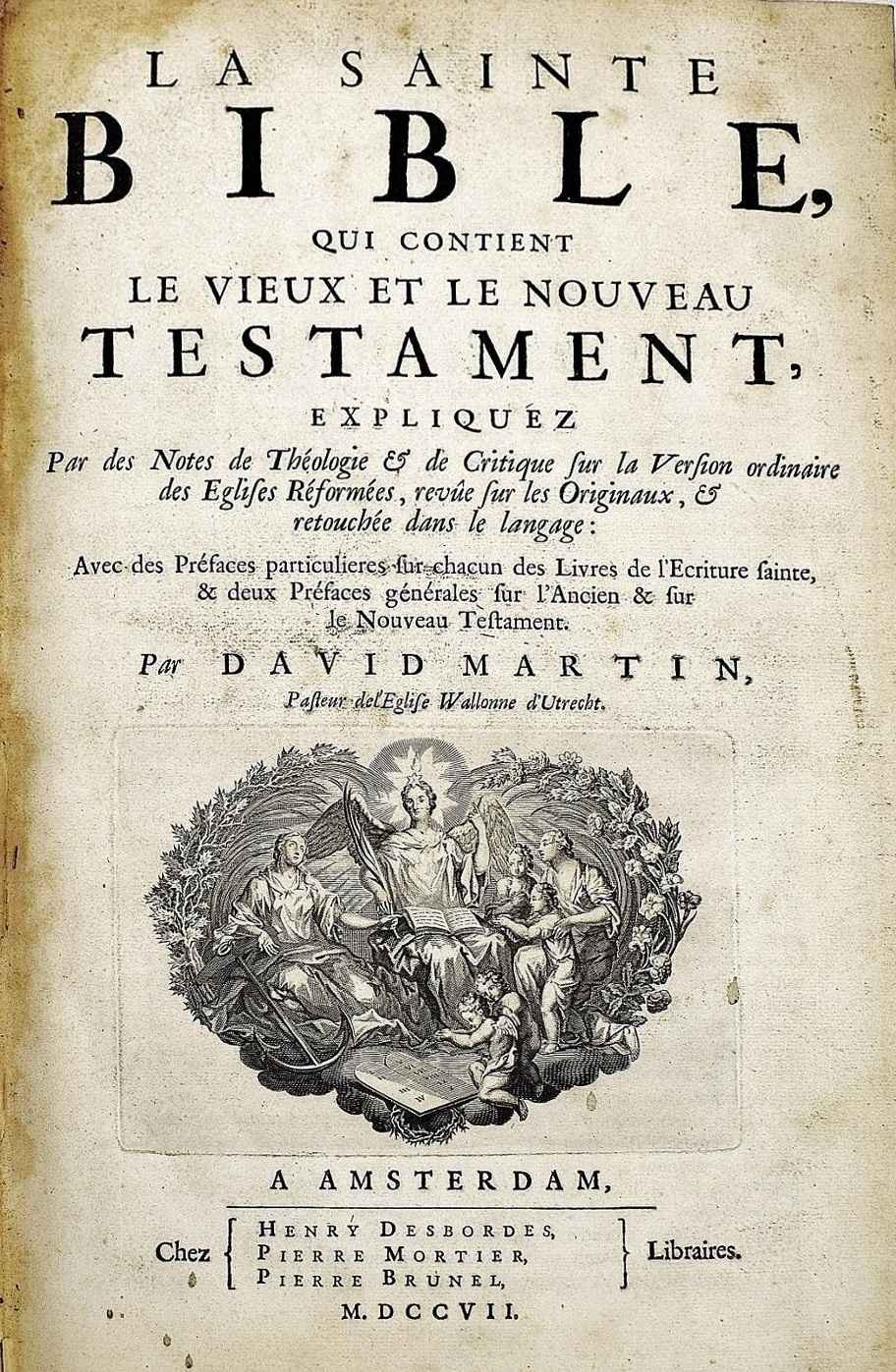 La Sainte Bible expliquée et retouchée dans le langage par David Martin, Amsterdam 1707